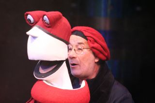 Željko Mavrović kao Sarastro u "Čarobnoj Fruli" (lutkarska adaptacija) u izvedbi ZKL. Snimljeno 9.9.2006. Autor: Davor Moravek. Dozvoljeno kopiranje uz navođenje autora i izvora. Izvor: News@Noebius Dozvola Template:Predložak:Cc-by-sa-2.5